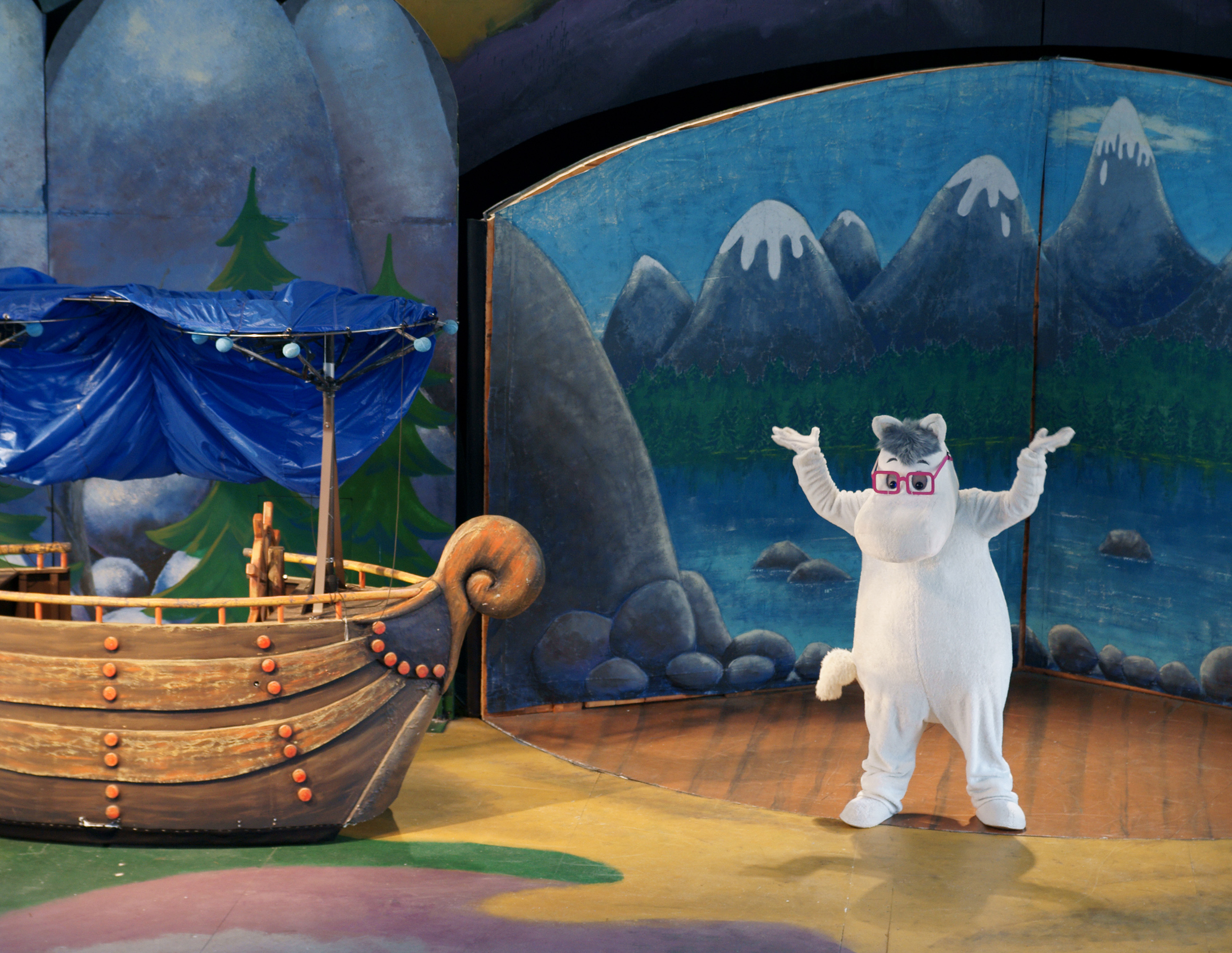 Niisku ja lentohärveli näytelmässä Teatteri Emmassa, Muumimaailmassa, Naantalissa.